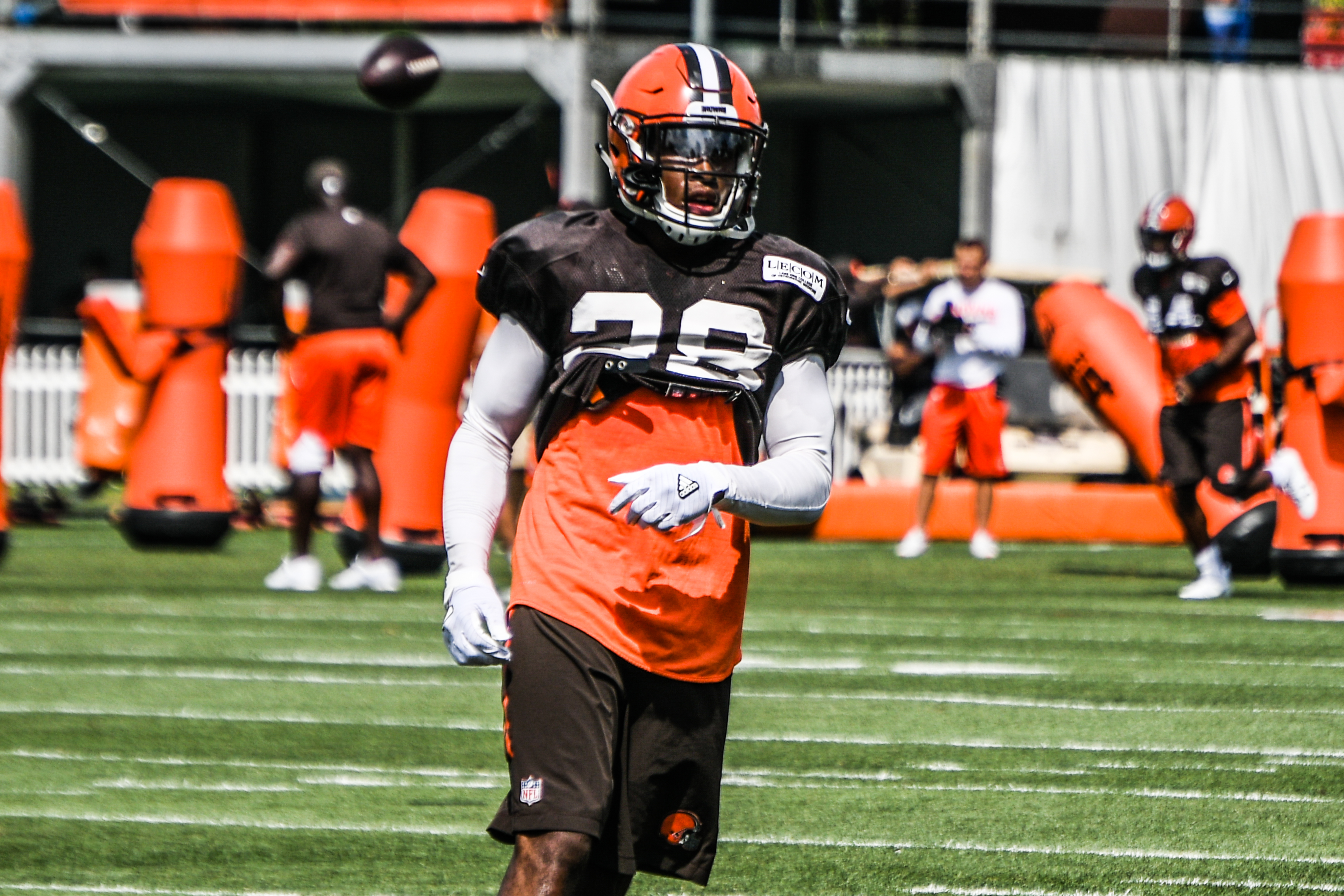 Jabrill Peppers